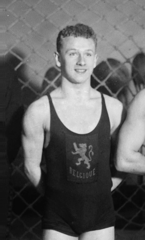 30-12-22, match France-Belgique, équipe de relais belge Joseph Callens: [photographie de presse] / [Agence Rol]